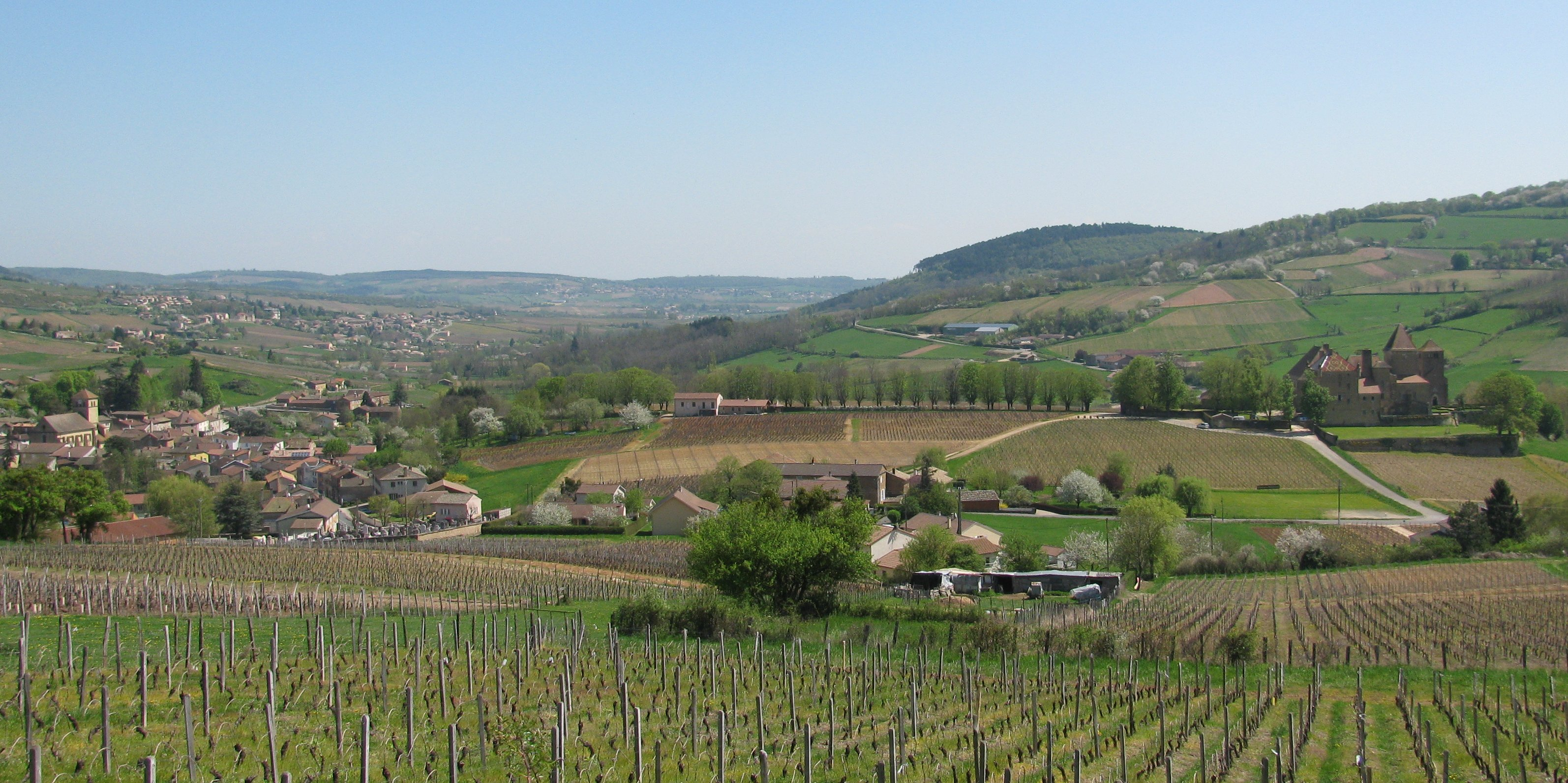 Château et village de Pierreclos, Saône-et-Loire, France. Image recadrée.